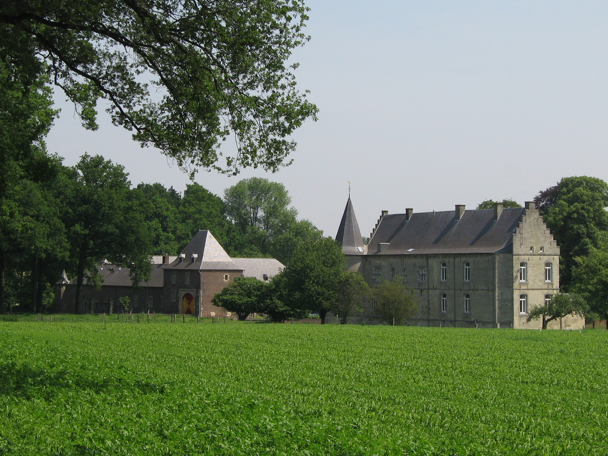 Kestiel Reviere bij Voelender. Kasteel Rivieren bij Voerendaal. "Rivieren" Csstle near Voerendaal, NL